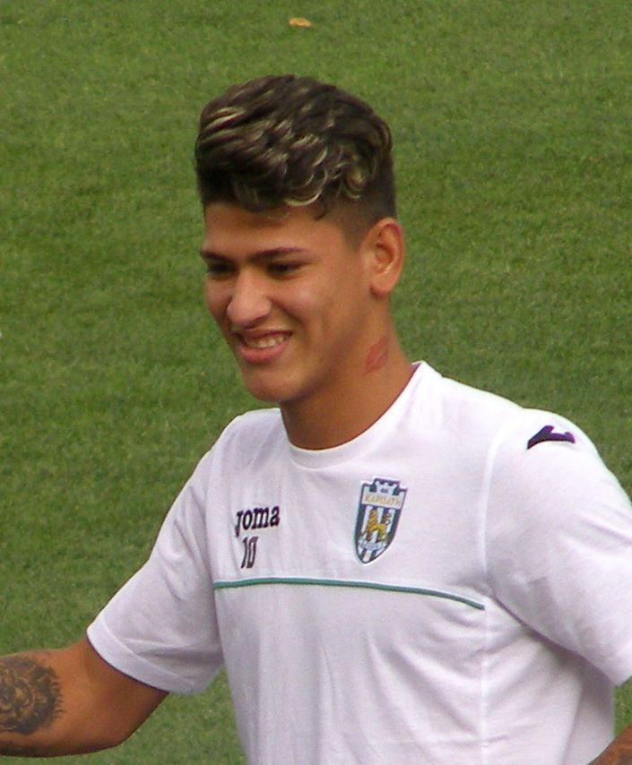 Хорхе Карраскаль під час представлення команди "Карпати" (Львів) перед сезоном 2017/18. Зустріч з уболівальниками